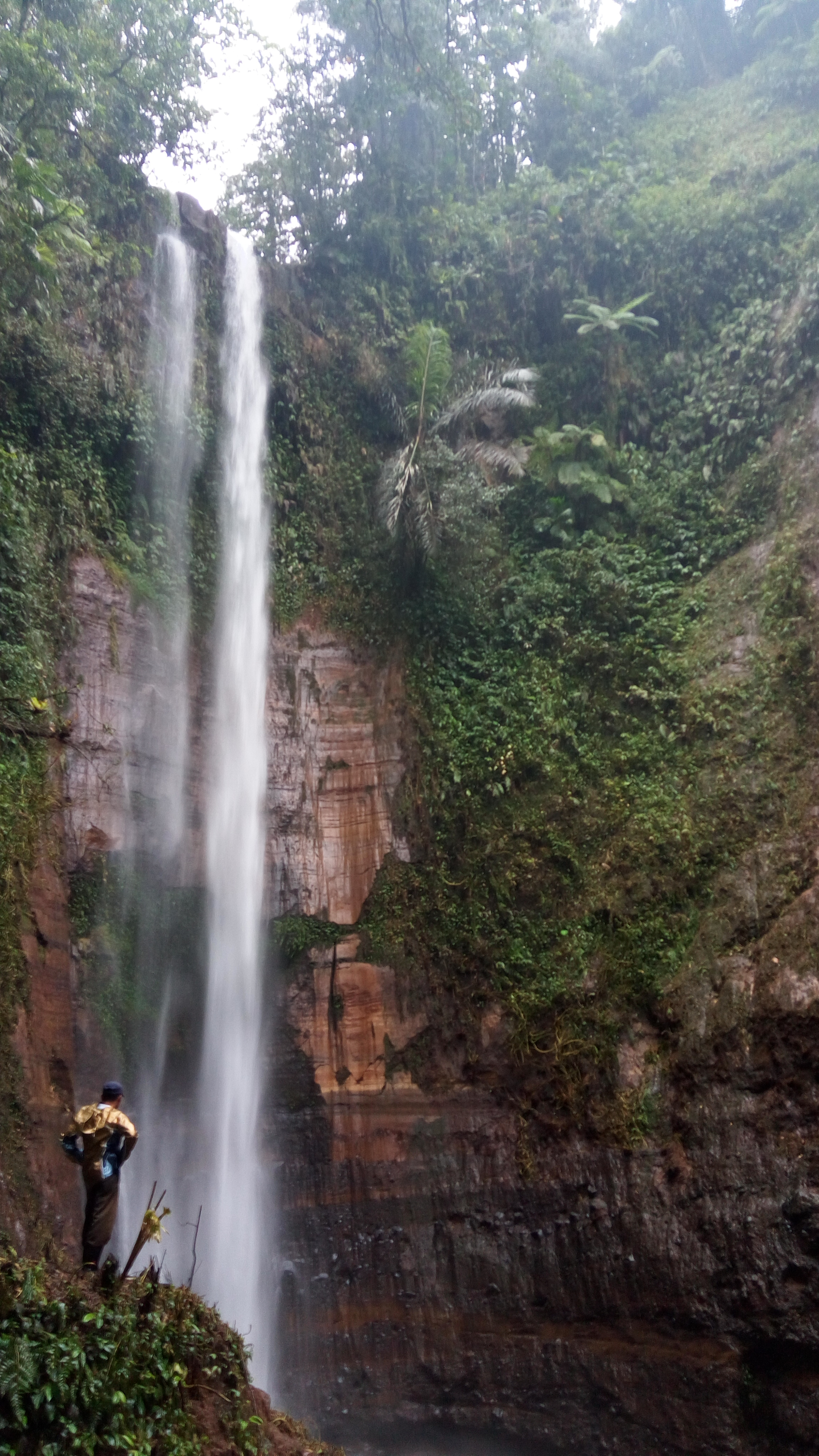 Air terjun Temponan Atas atau dikenal juga dengan nama Air Terjun Tiu Tiding. Salah satu objek wisata alam dalam kawasan hutan lindung di wilayah Desa Genggelang, Kec. Gangga, Kab. Lombok Utara, Prov. Nusa Tenggara Barat.